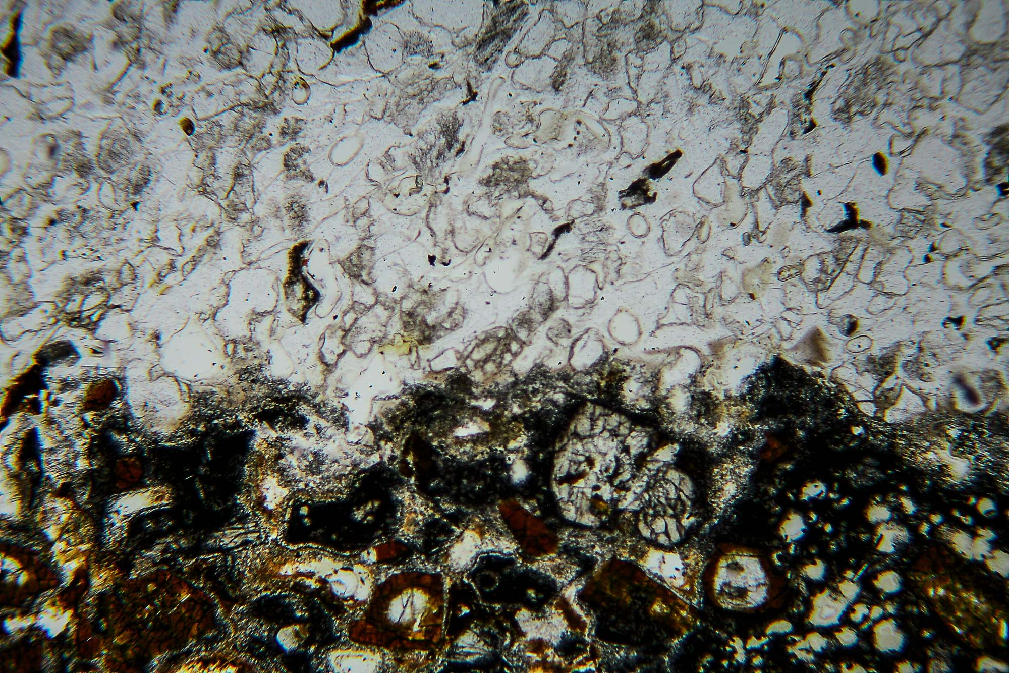 Kontakt Basalt-Buntsandstein vom Wildenstein b. Büdingen (Dünnschliff)